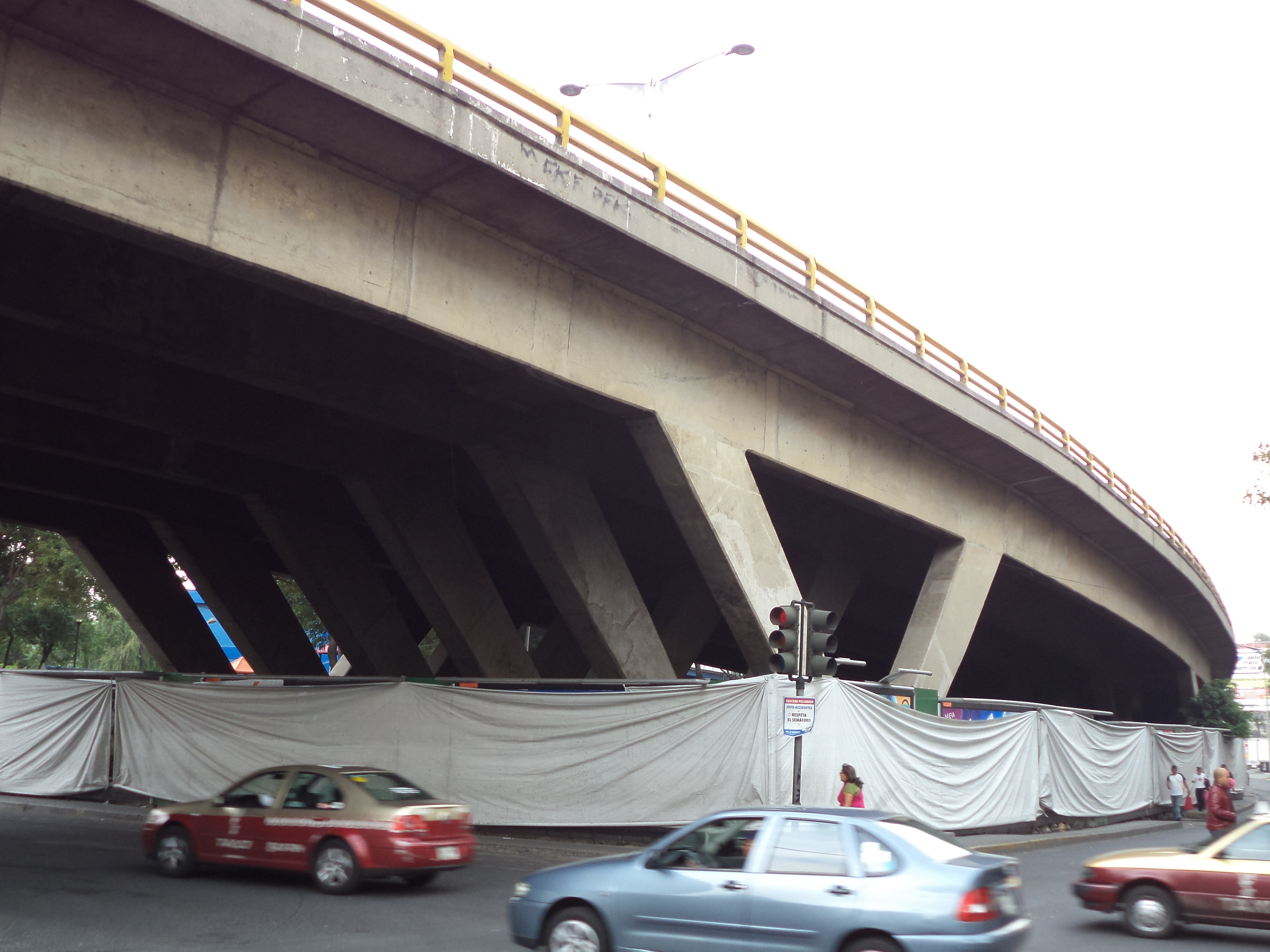 Avenida Rio San Joaquin